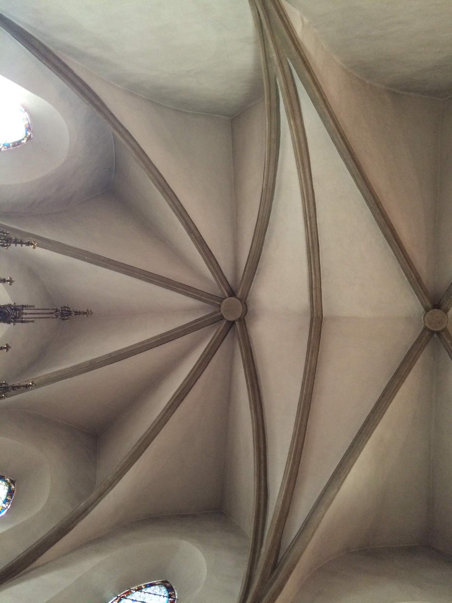 Presbytář kostela je zaklenut pětibokým šestipaprskovým závěrem a dvěma obdélnými křížovými poli.